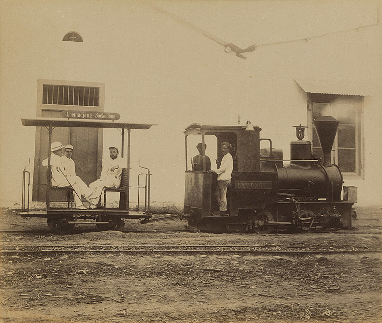 Orenstein & Koppel - Zuckerfabrik Soekodono, Java (wohl bei Loemadjang, Lamongan)